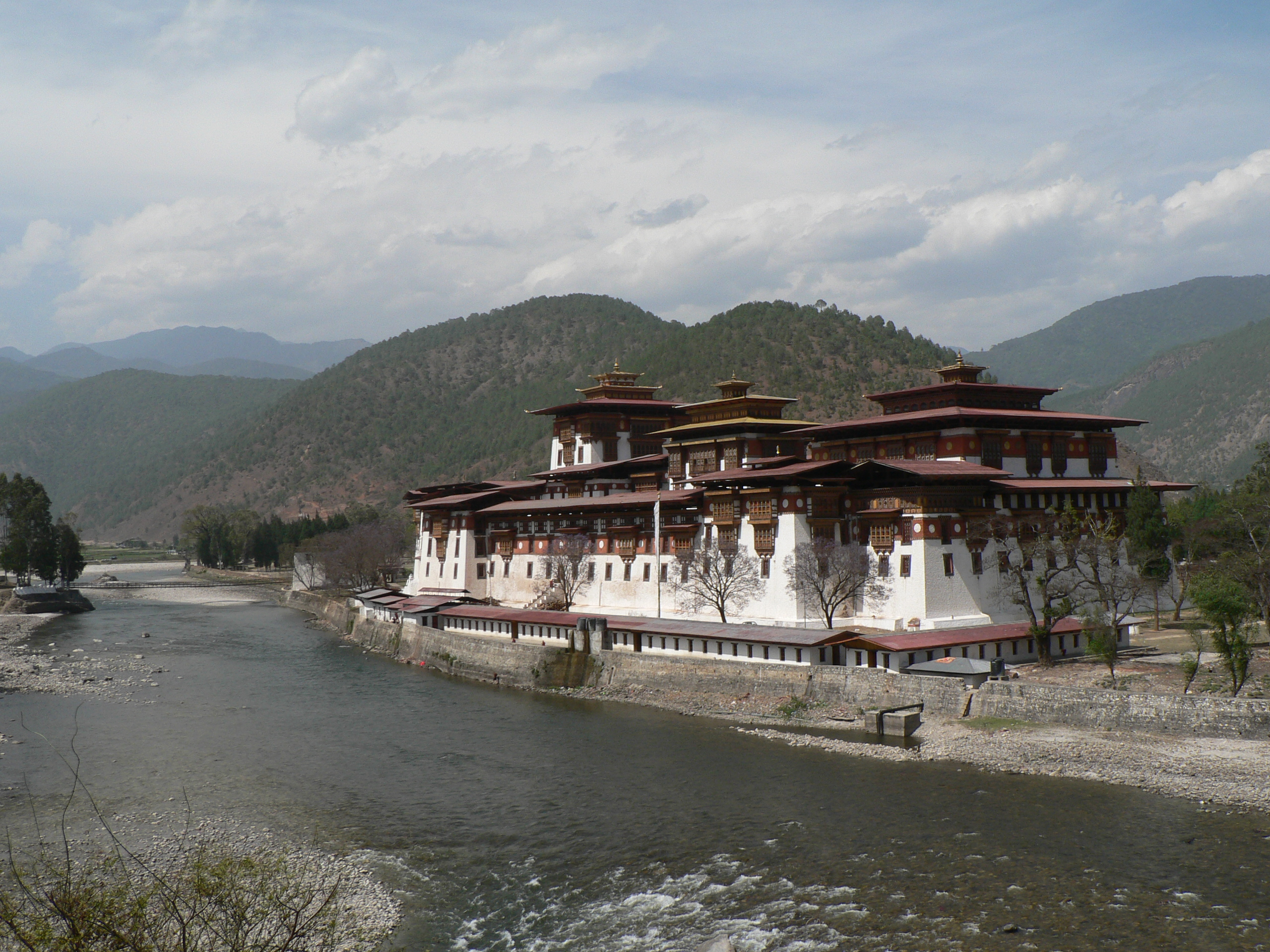 Puntang Dechen Phodrang Dzong in Punakha, or "Punakha Dzong", in Bhutan